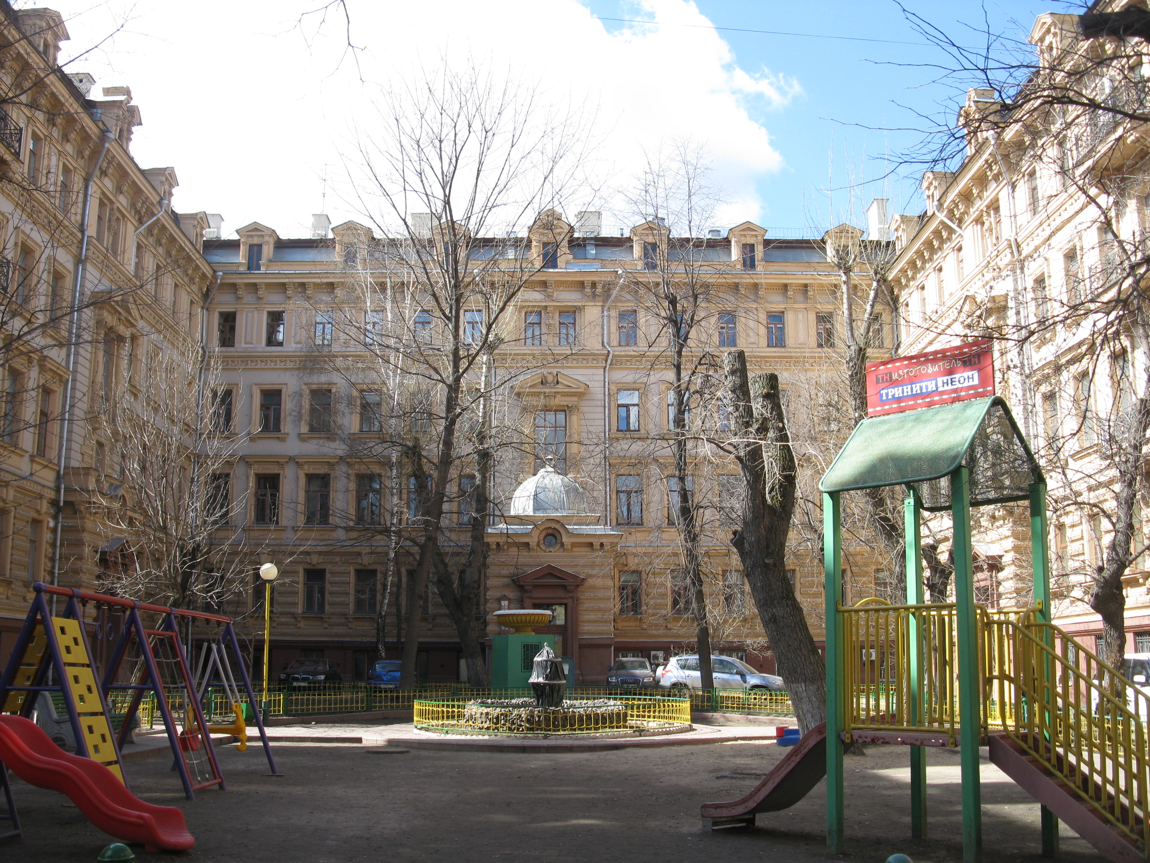 Дом доходный: Романов пер., дом 3, строение 6, Арбат, Центральный округ, Москва